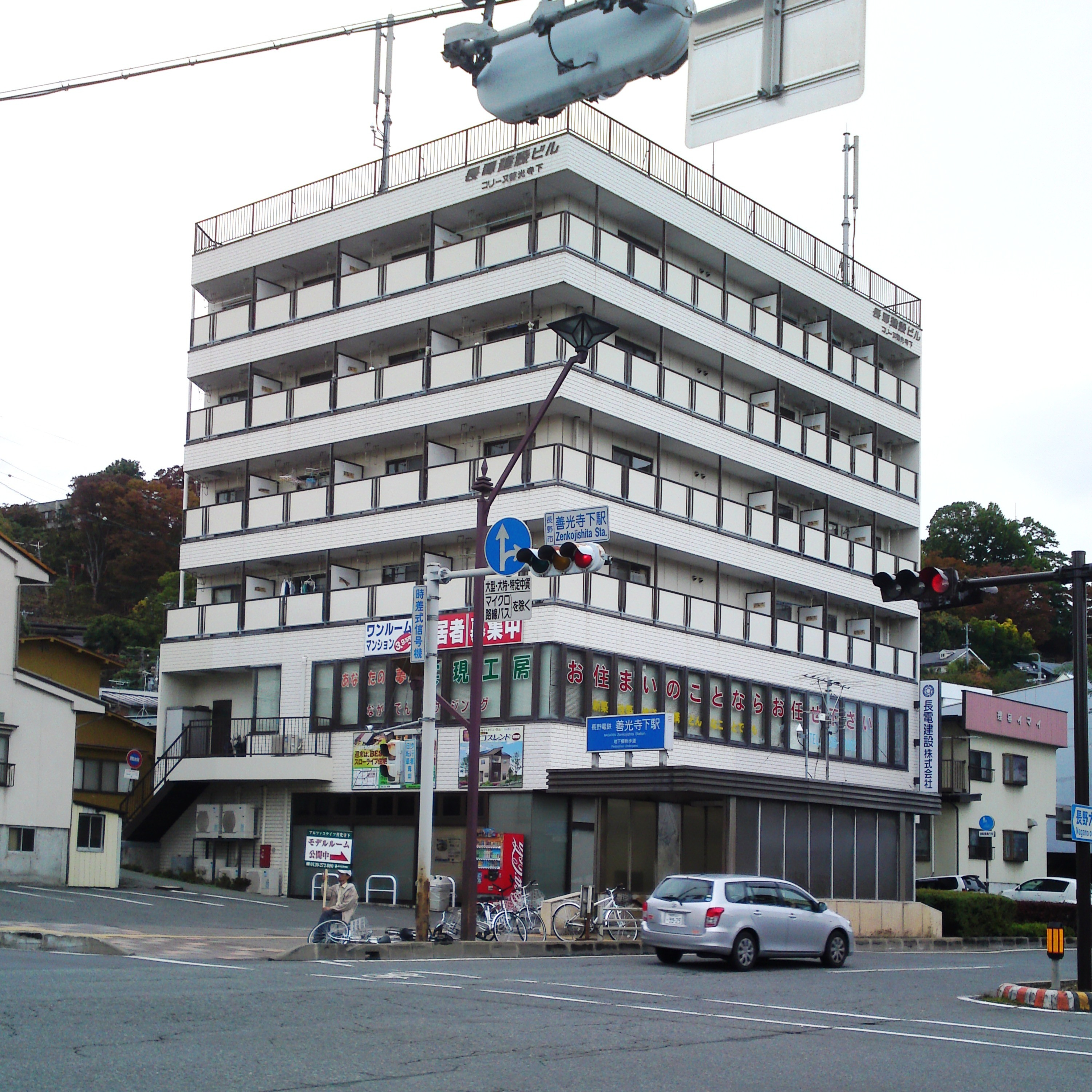 長電建設ビル（本社）